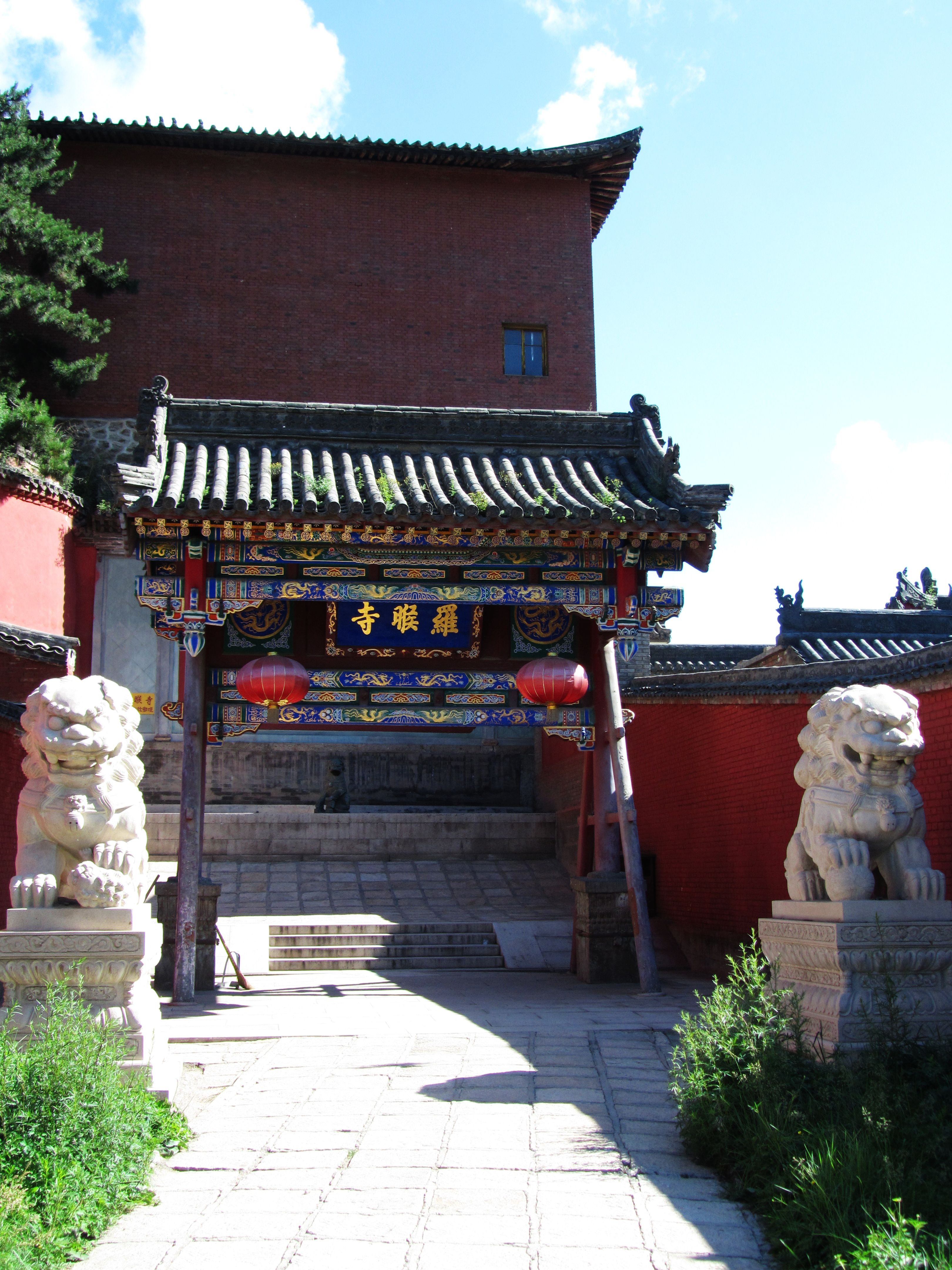 五台山罗睺寺，临街牌坊。